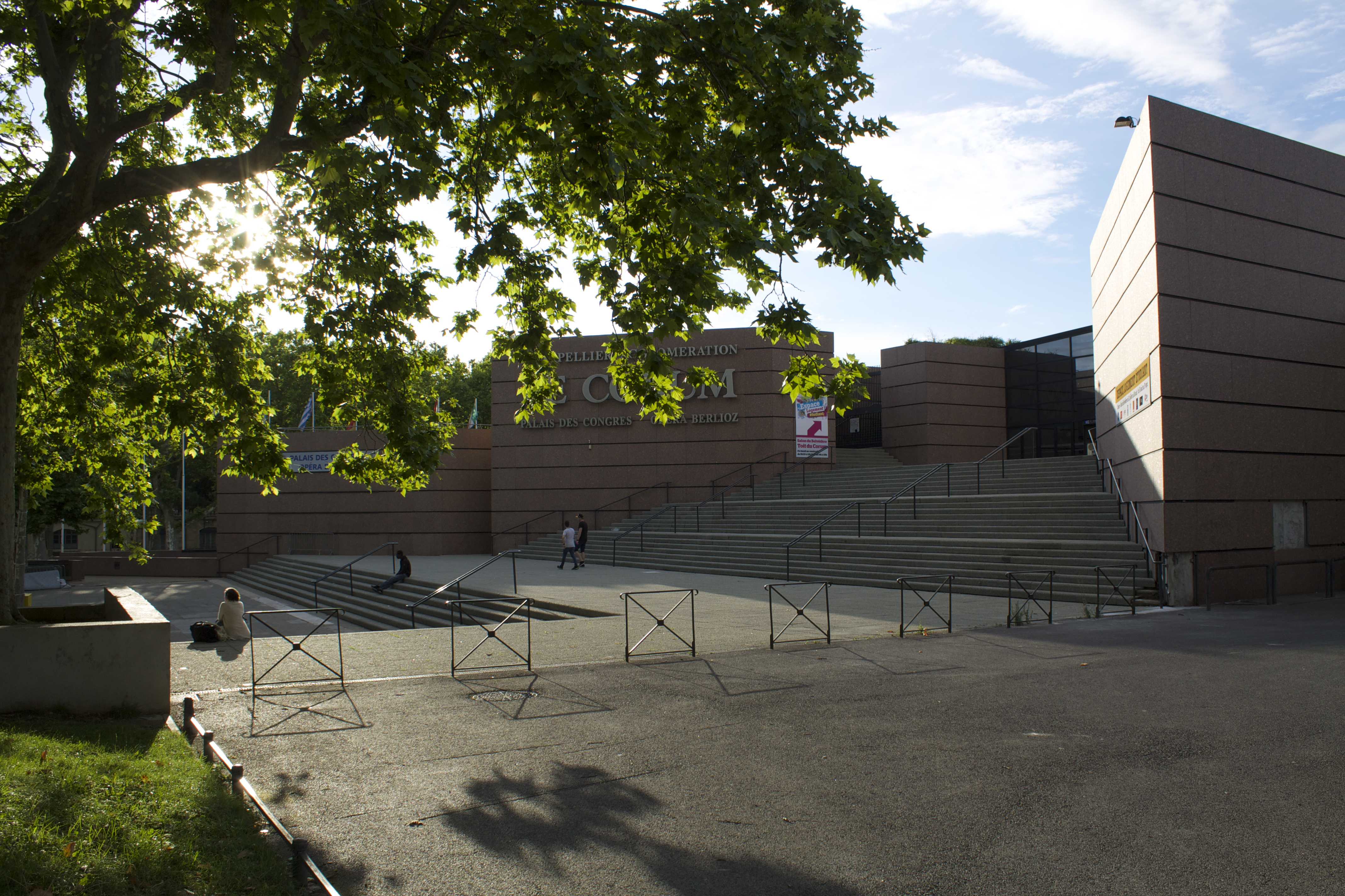 Montpellier, France